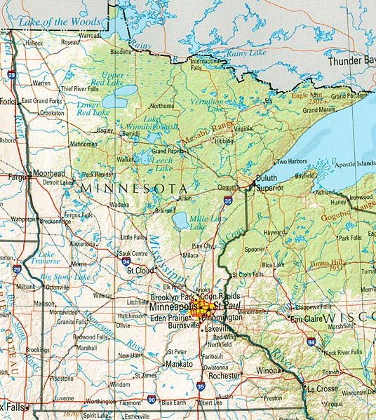 Karte Minnesotas